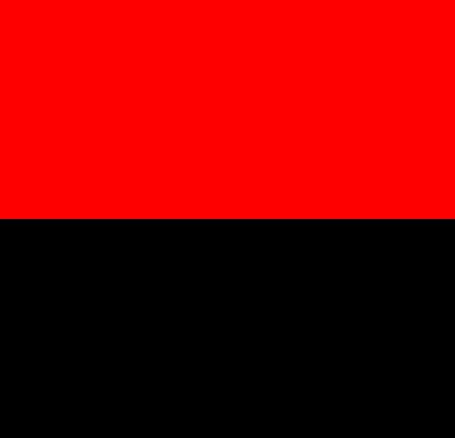 Das Fuxenband AT Alemannia Basel.